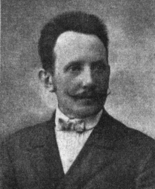 Österreichischer Politiker, Reichsratswahl 1907, Name siehe Dateiname